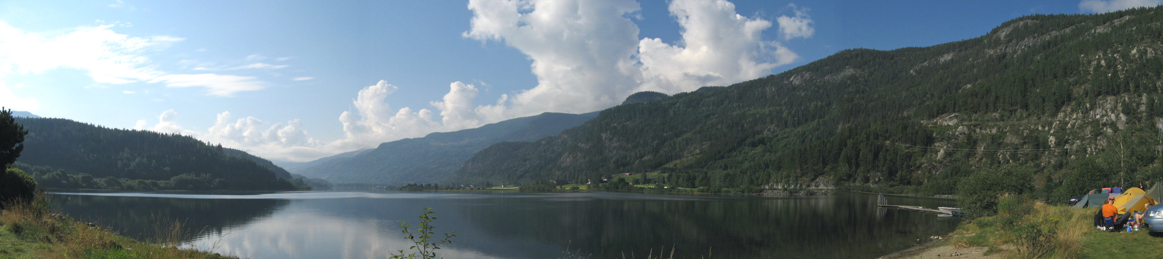 View of Hallingdalselva from Liodden Camping